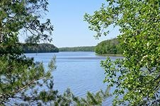 Озеро Виша, Муромский район This image is related to the protected area of Russia number 3310166